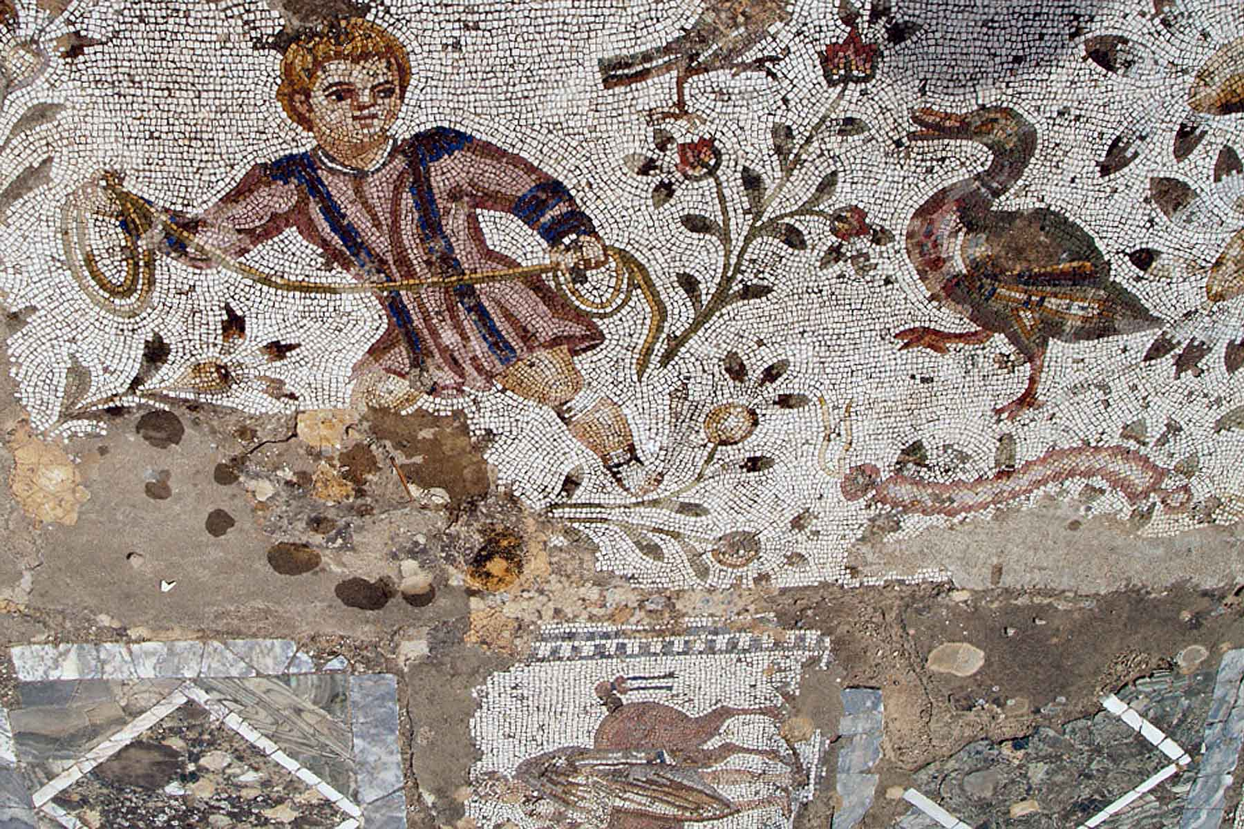 Carthage Mosaïque des chevaux Détail